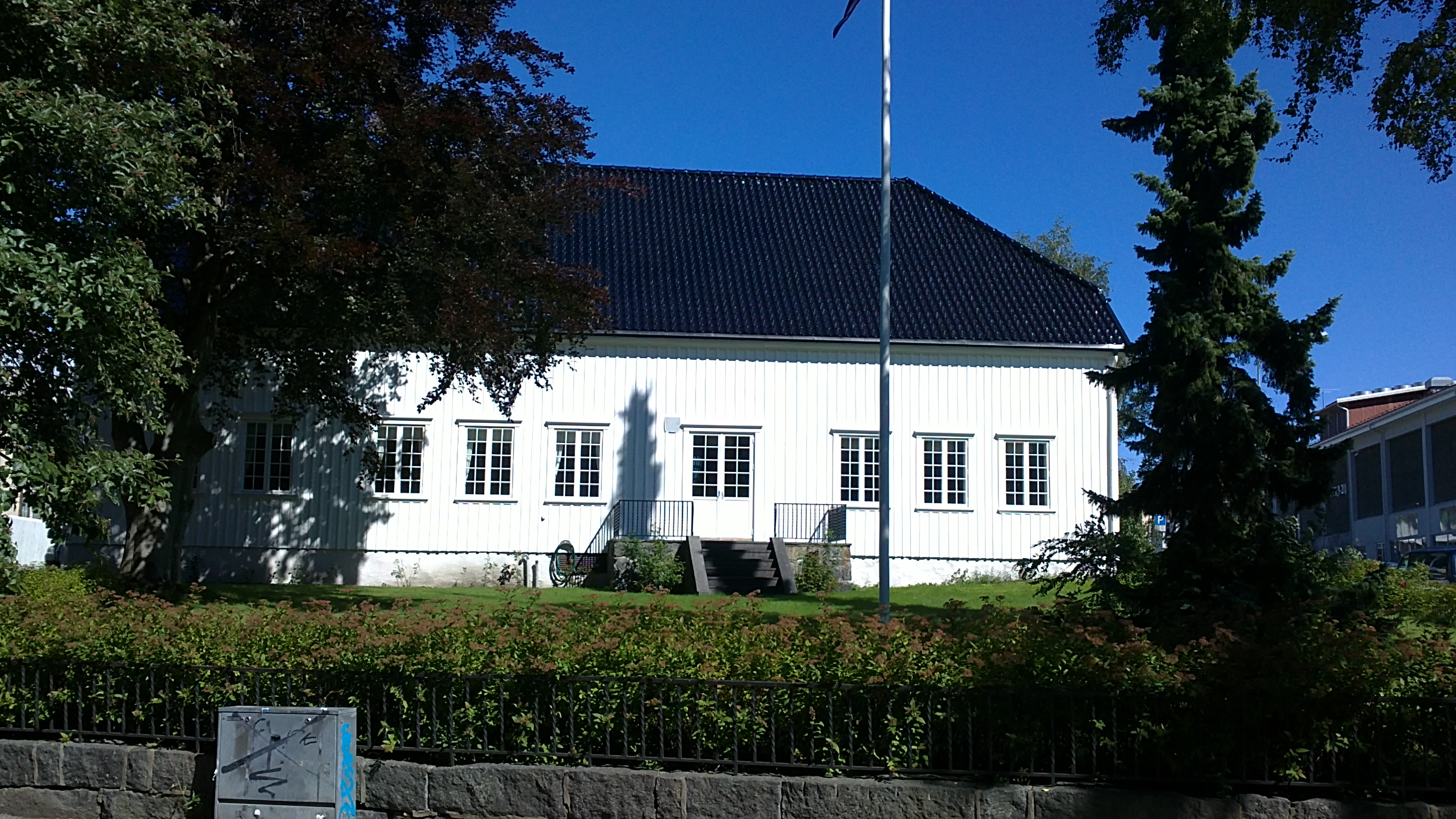 Bilde av landgården Jegersborg